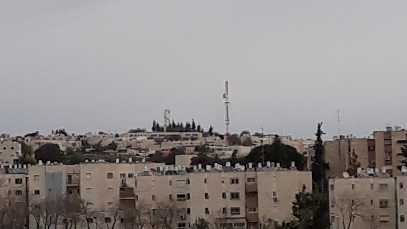 גבעת חרסינה מעל בתי קריית ארבע - מבט מ"בית השלום" צפונה, מרץ 2019